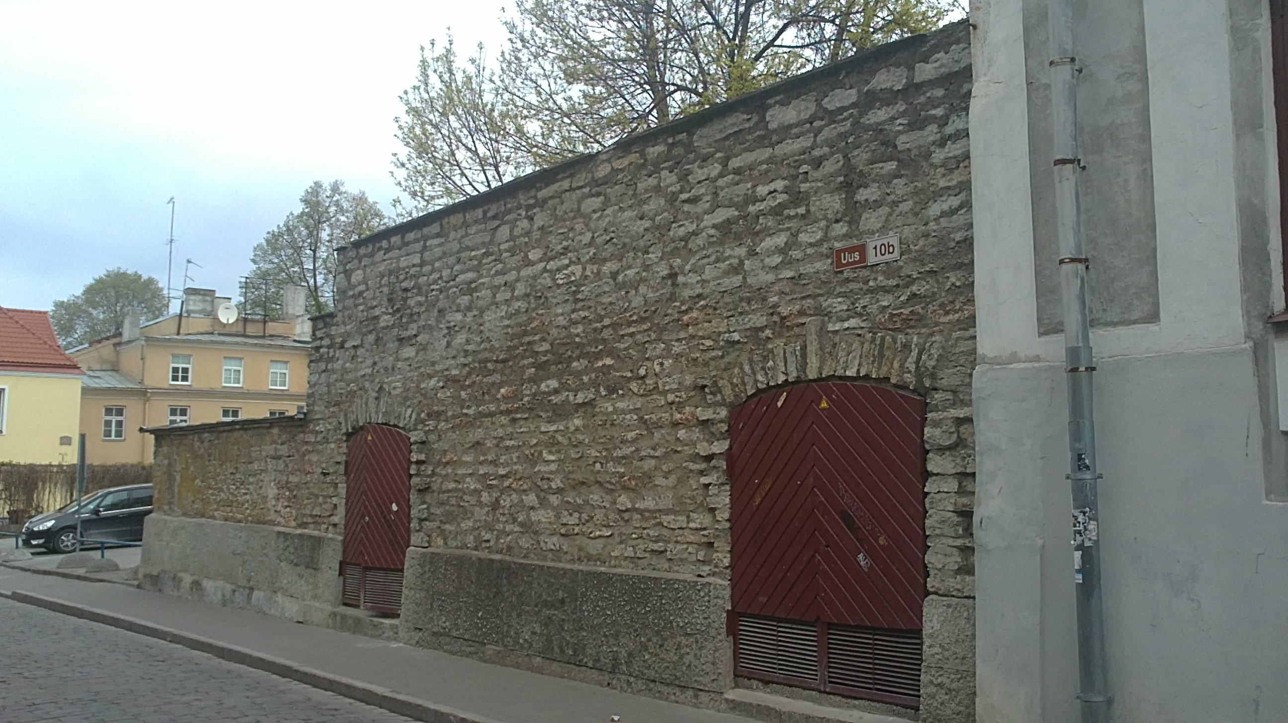 Säilinud Tallinna linnamüüri osa Väikese Rannavärava ja Viru väravate vahelisest linnamüürist, Uuel tänaval